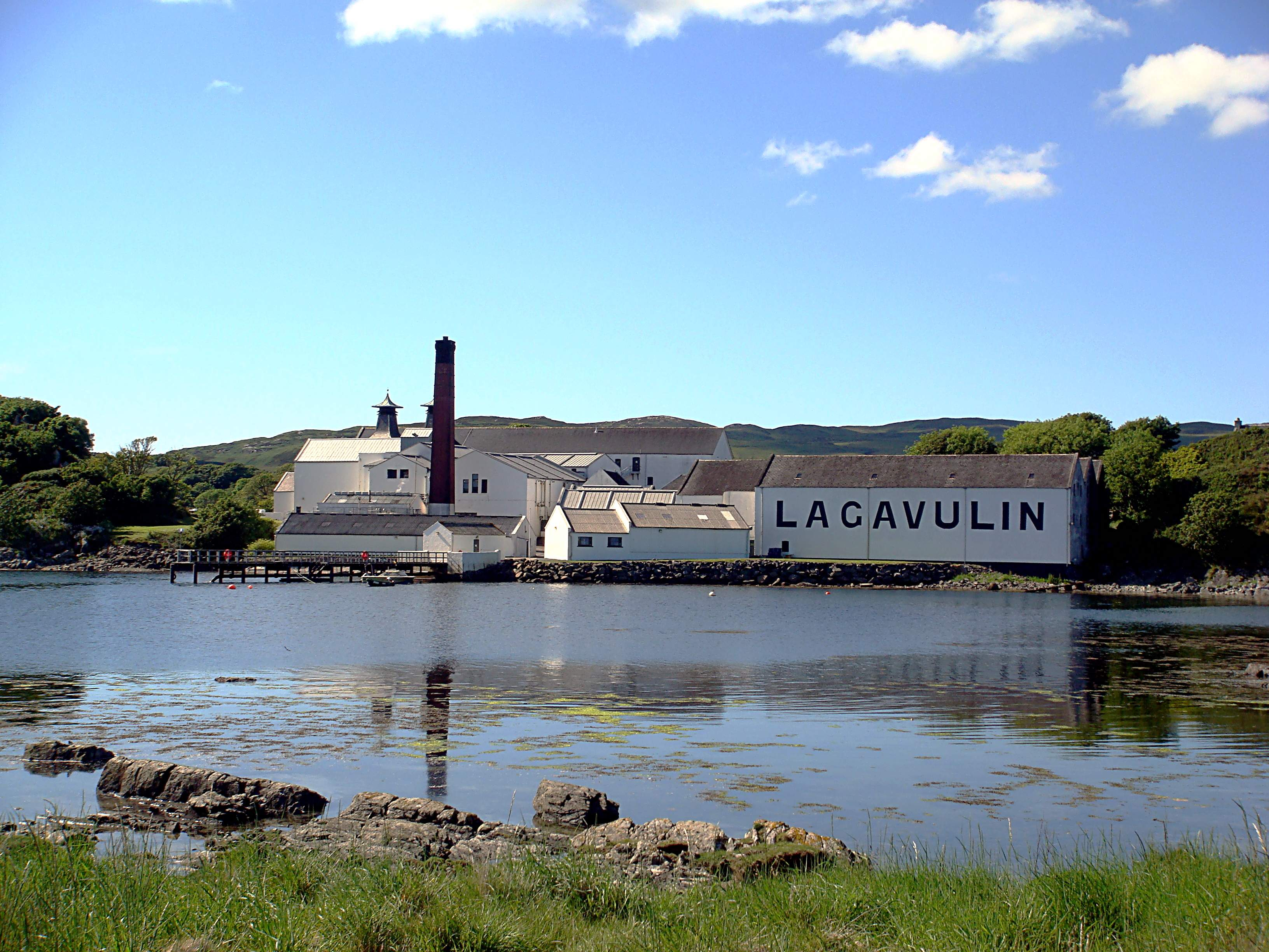 Gebäude der Lagavulin Distillery